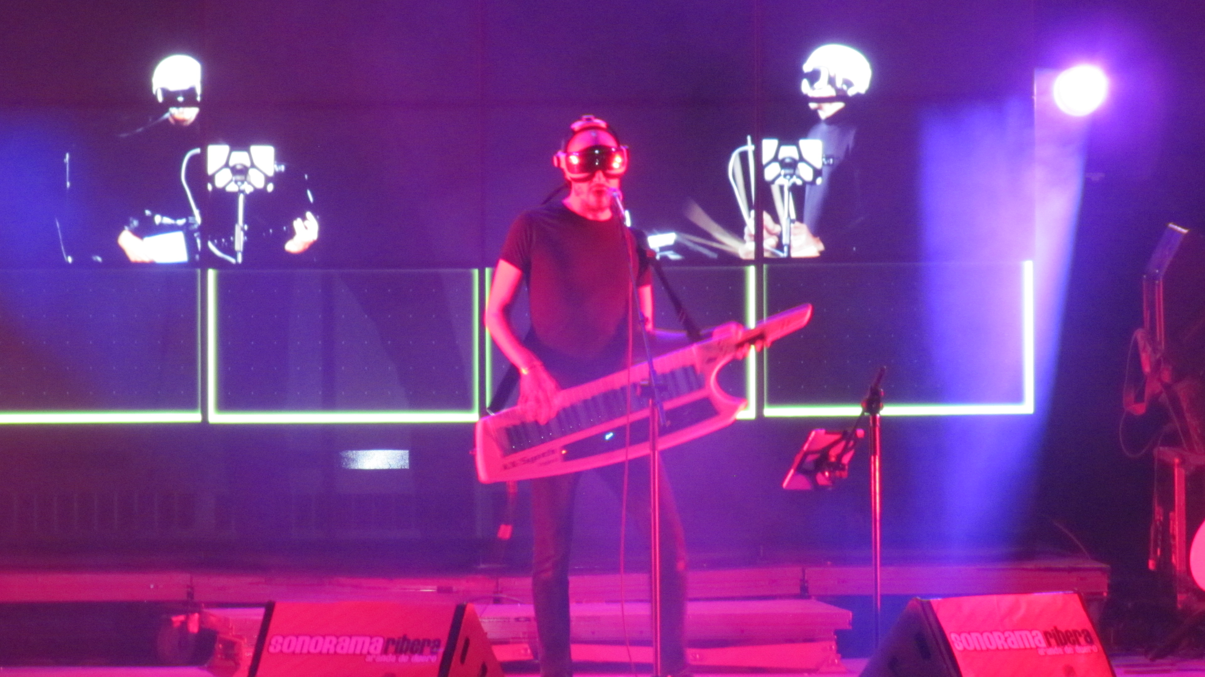 Concierto de La Casa Azul durante el Festival Sonorama Ribera 2012